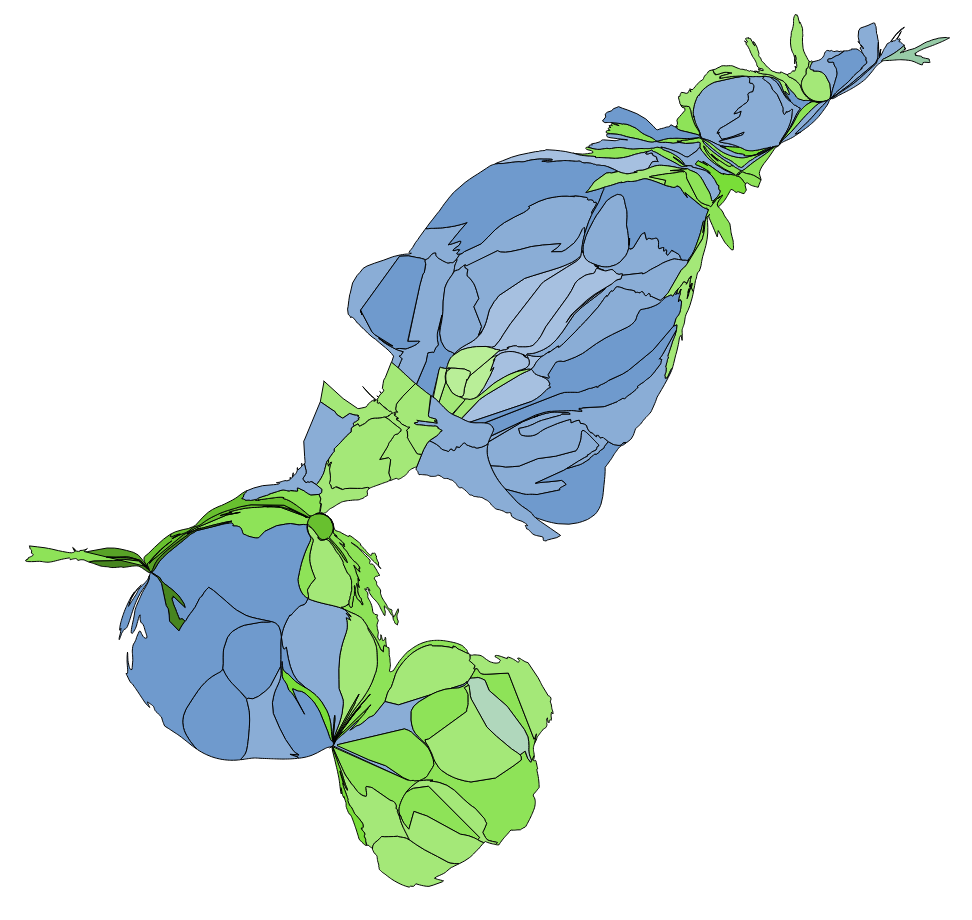 顏色對照表